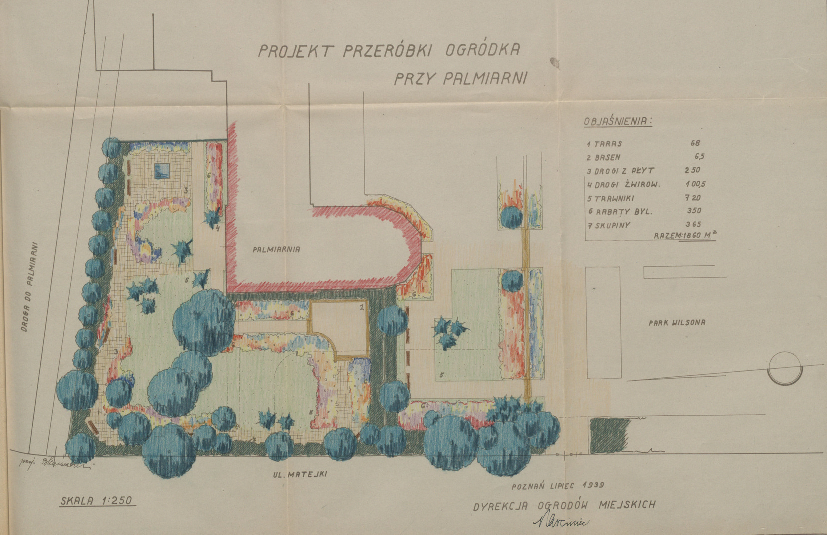 dyrekcja ogrodów miejskich